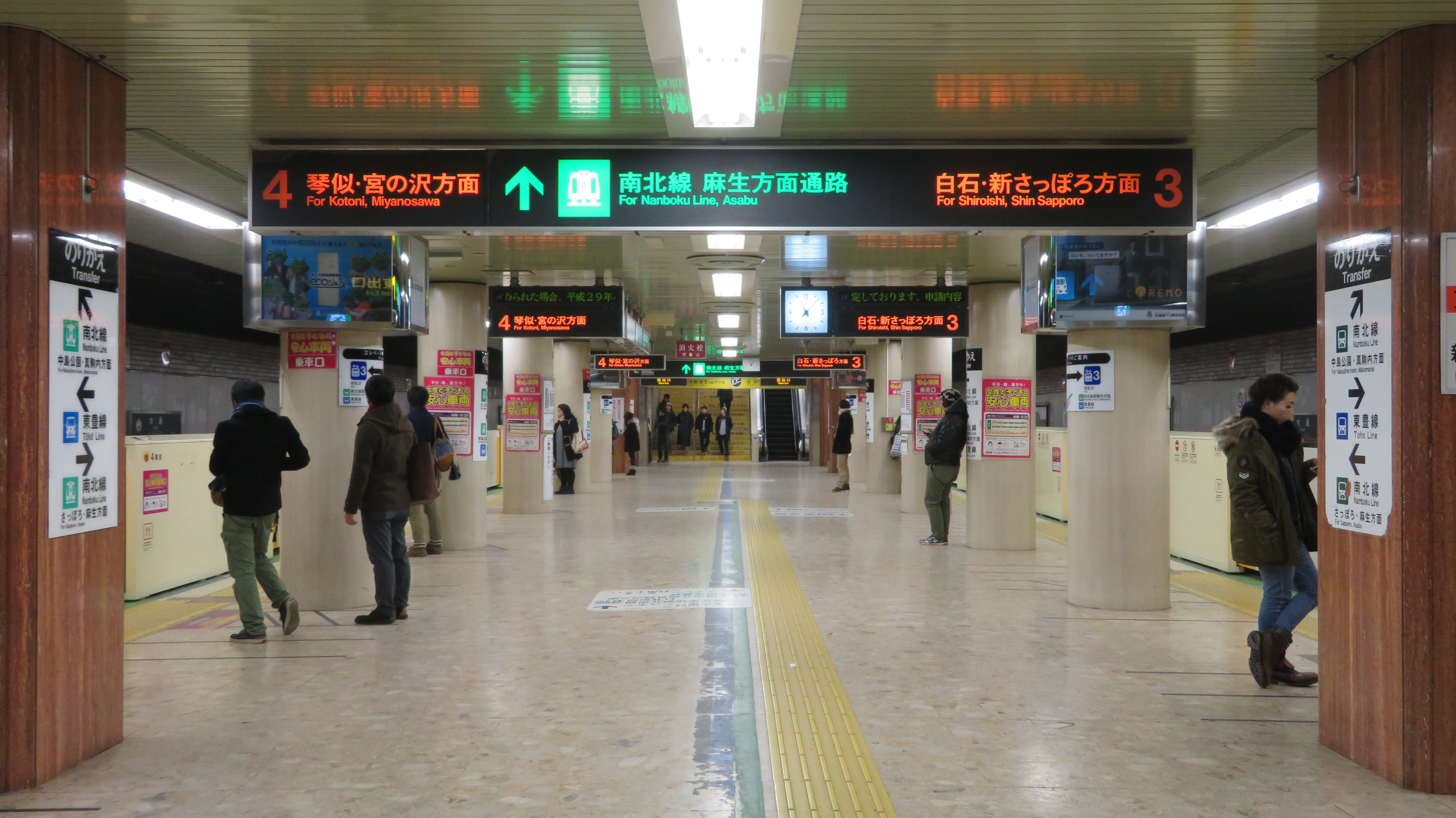 東西線大通駅ホーム